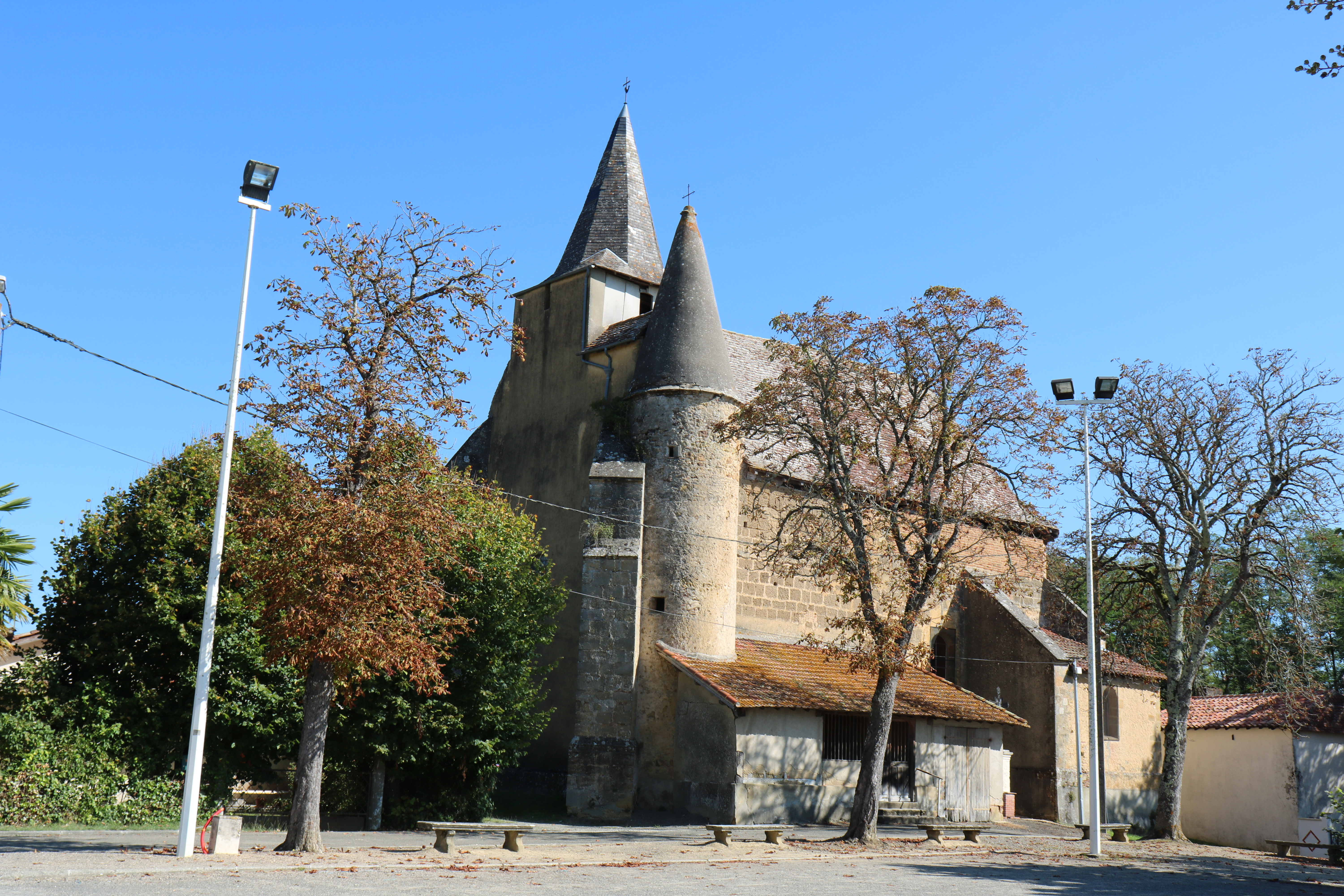 L'Eglise Saint-André d'Urgosse